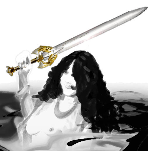 Artiste Britton La Roche. Épée Excalibur de La Fée Viviane et de Roi Arthur.